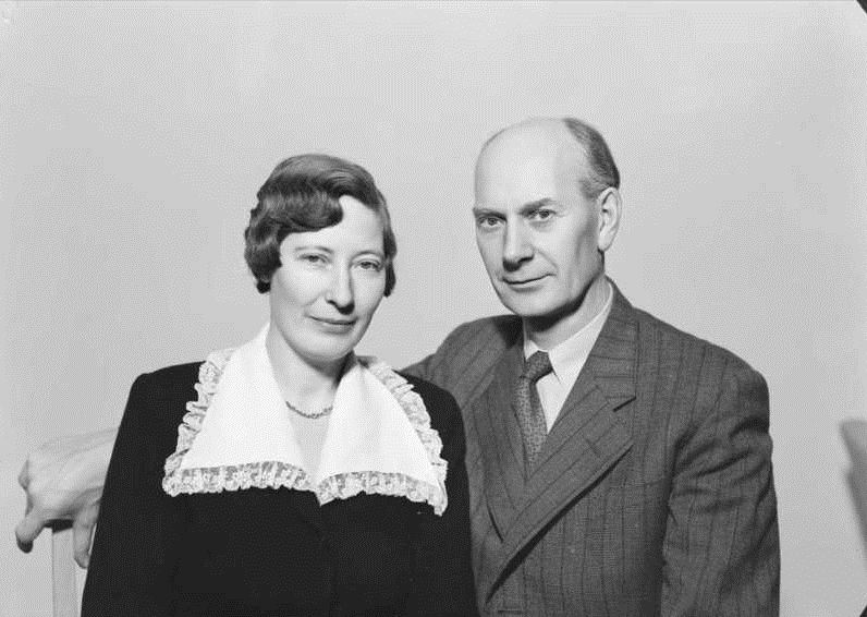 Werna og Einar Gerhardsen